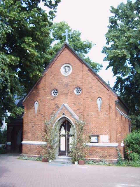 evangelische Kirche in Lübbenau-Neustadt Bild aufgenommen am 18.6.2006 von Olaf Meister